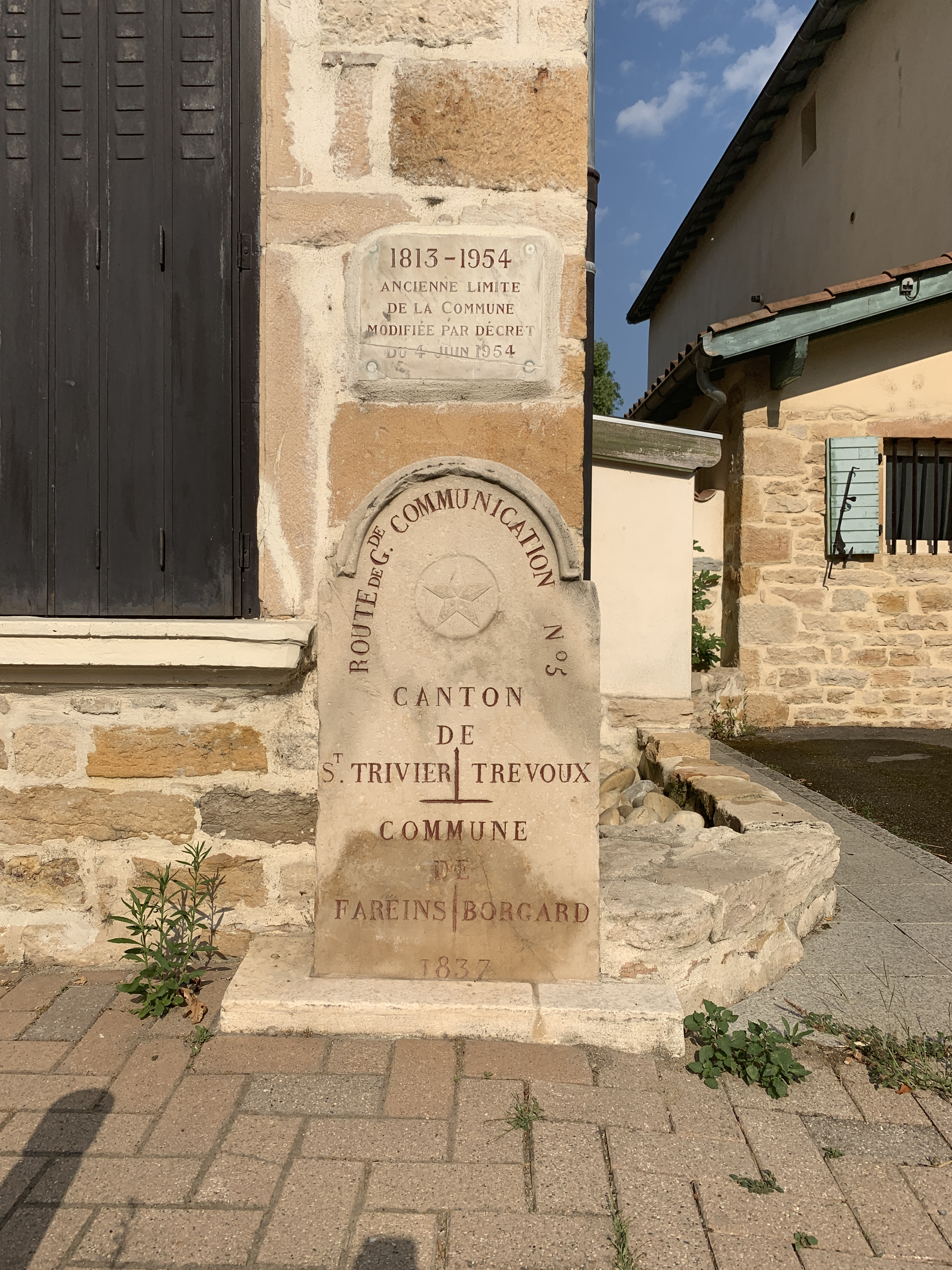 Borne de la route de Grande Communication n°5 donnant la délimitation communale entre Fareins et Beauregard telle qu'elle le fut avant 1954, rue Hector Berlioz, Beauregard, Ain.